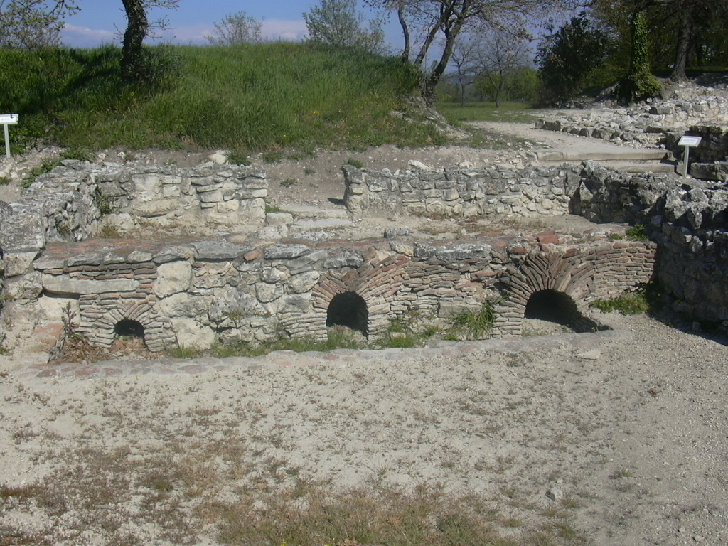 Vue des ruines de l'Oppidum d'Entremont, Aix-en-Provence, France